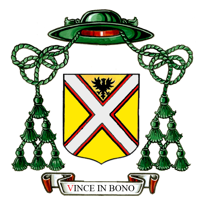 Wapenschild van Jacobus Boonen